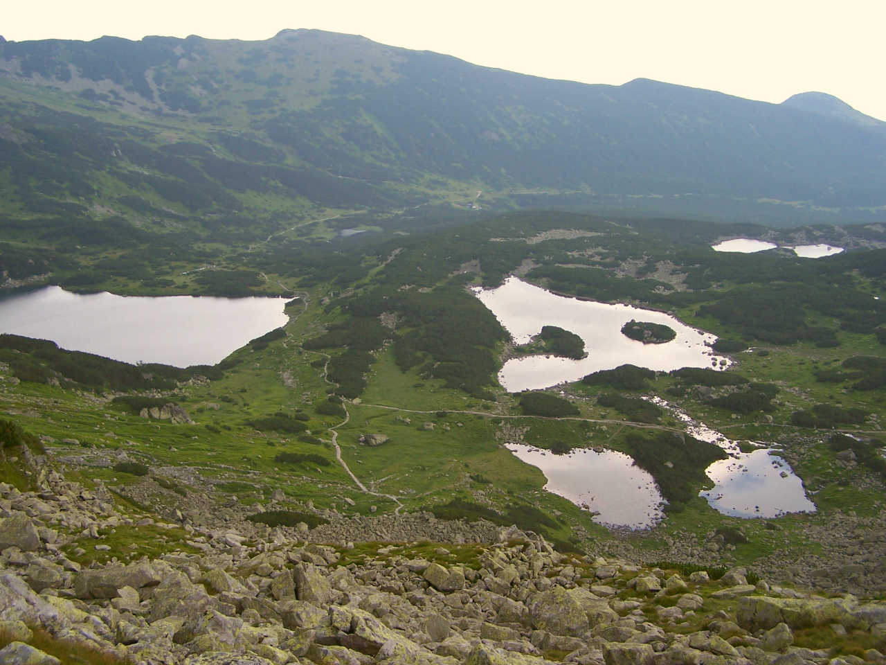 Stawy Gąsienicowe (Tatra Mountains, Dolina Gąsienicowa)